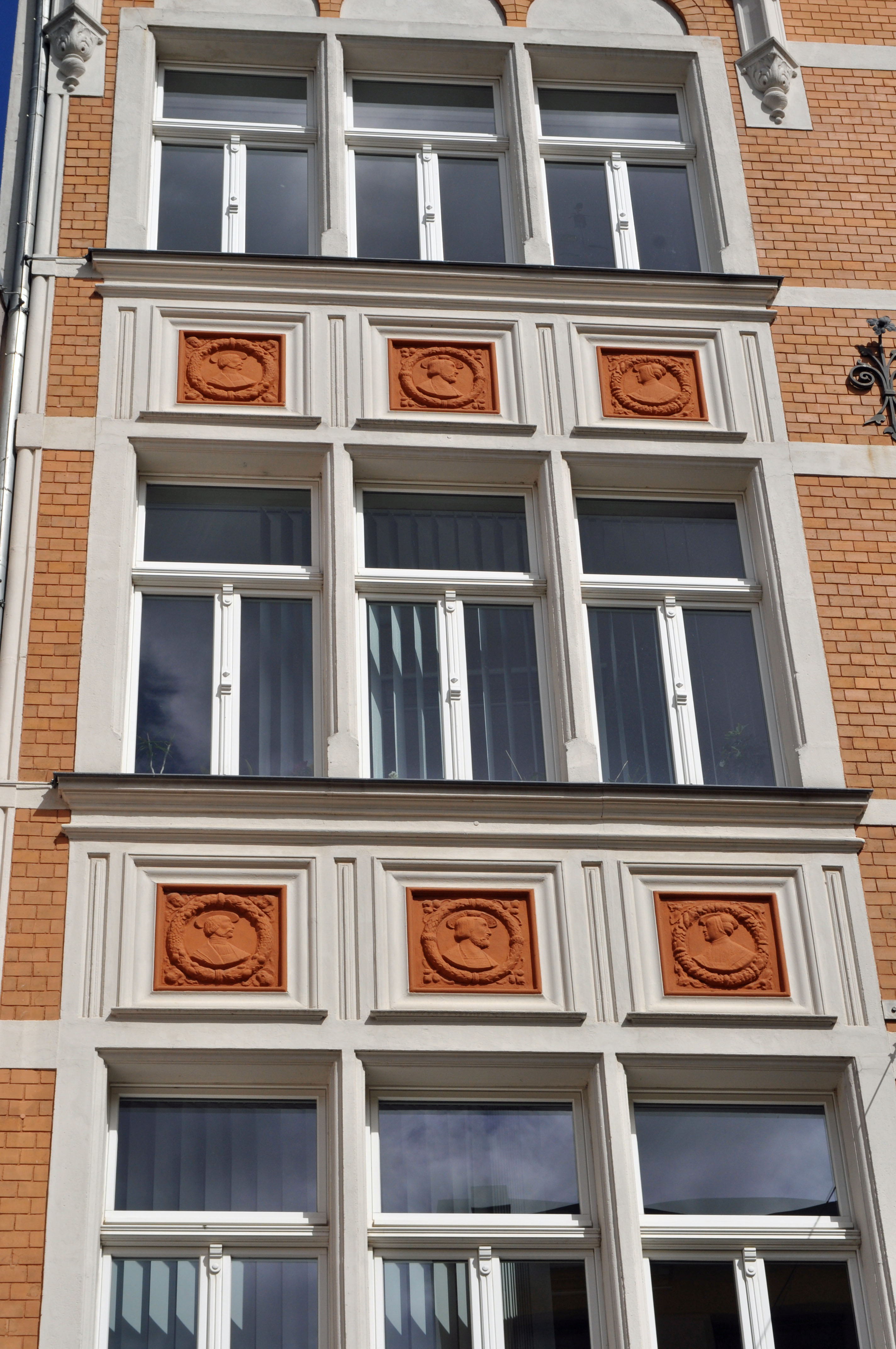 Gebäude in Stralsund, siehe Dateiname